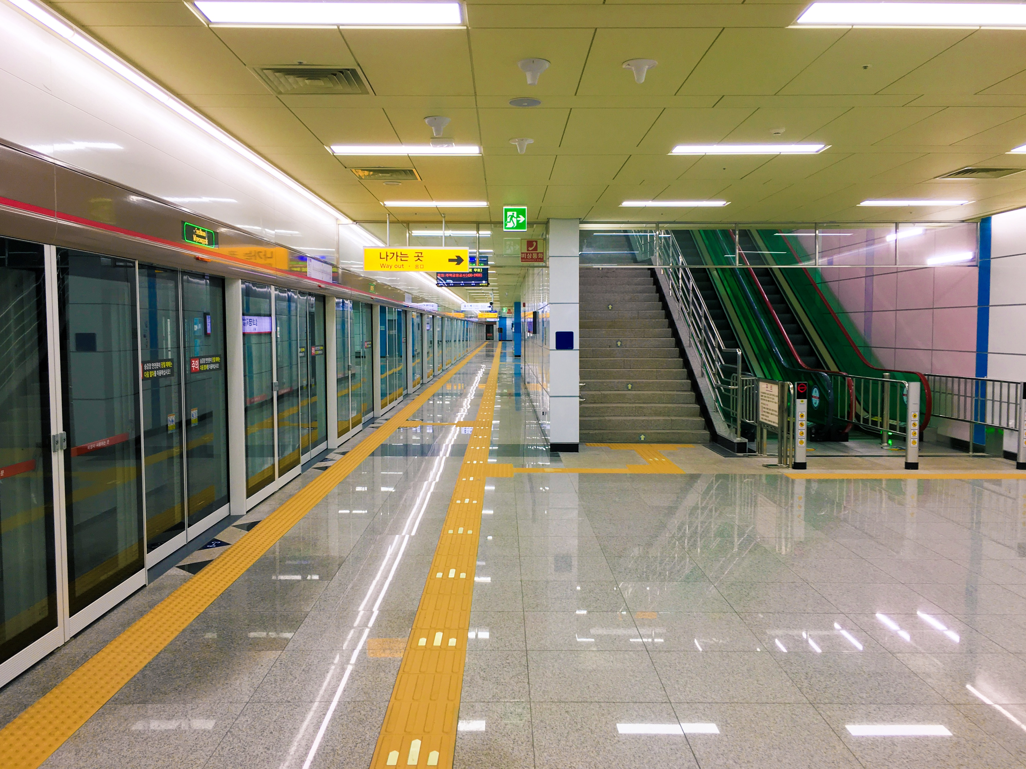 설화명곡역 승강장